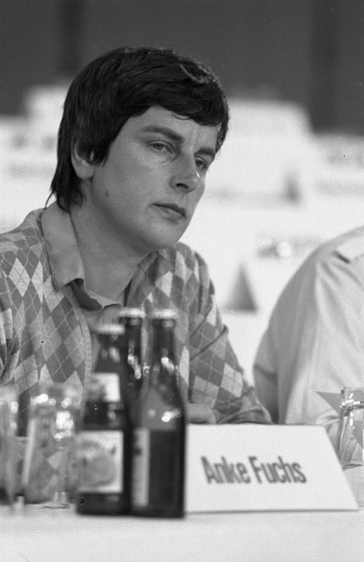 SPD-Parteitag in der Oympiahalle in München